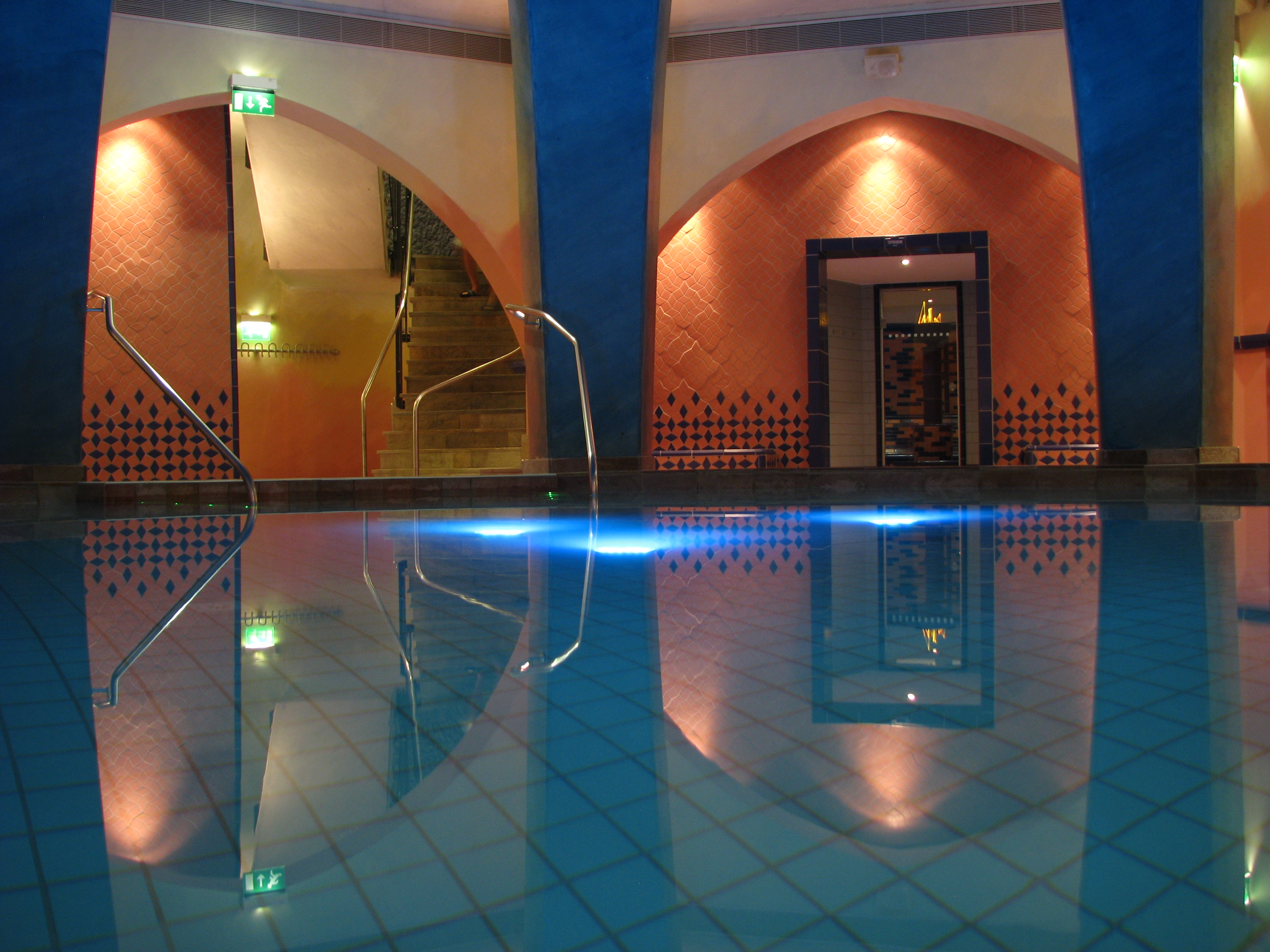 Blick auf den Ruhepool mit 34°C warmem Thermalwasser in der orientalischen Badewelt der Carolus Thermen in Aachen, im Hintergrund der Zugang zum Tepidarium.